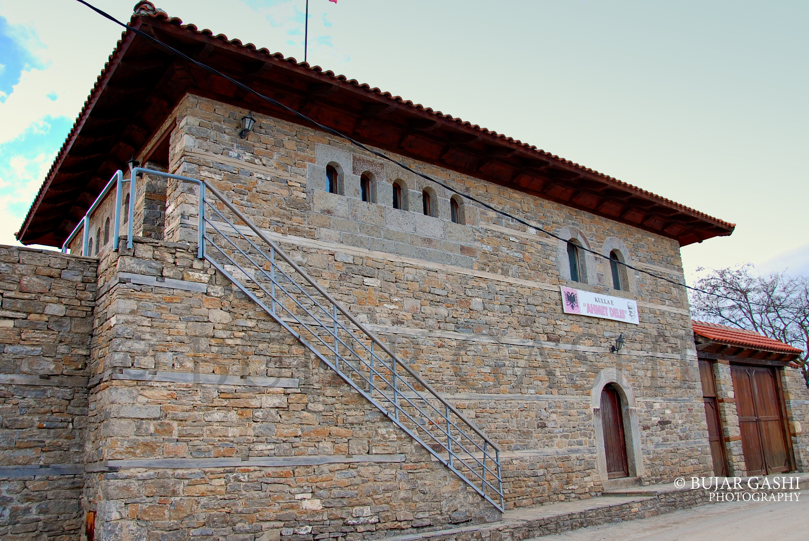 Kulla e Ahmet Delisë